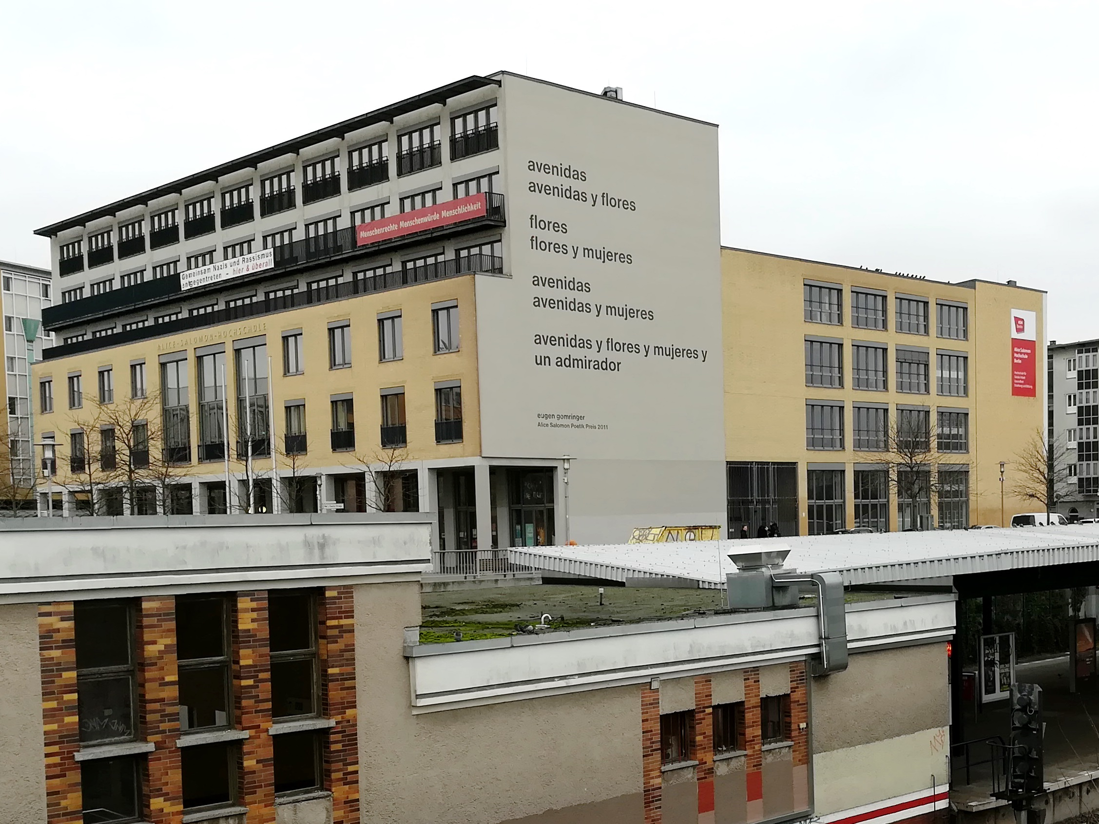 Gebäude der Alice-Salomon-Hochschule in Berlin-Hellersdorf mit dem Gedicht "avenidas" von Eugen Gomringer auf der Fassade. Im Vordergrund der U-Bahnhof Hellersdorf.